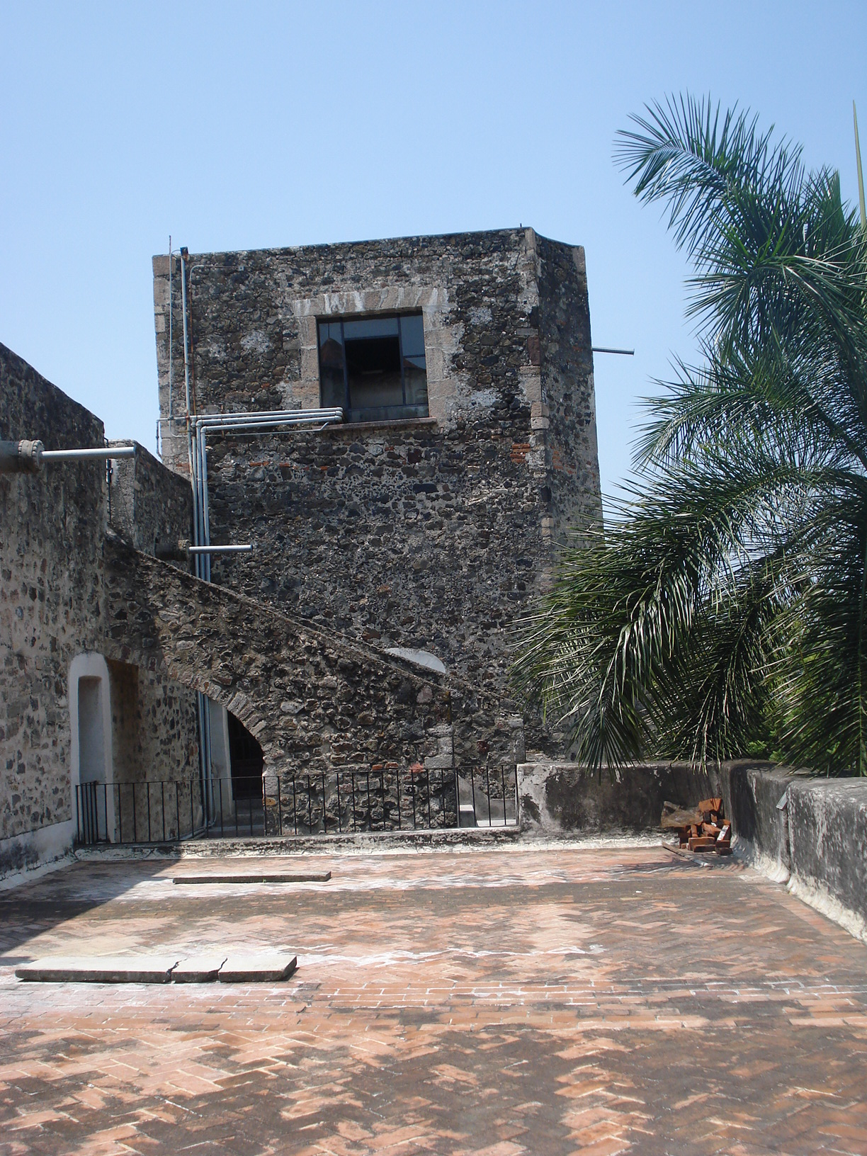 Santo Domingo de German, Oaxtepec, Morelos, Mexico